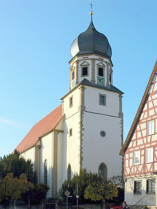 St. Mauritius in Oedheim, Baden-Württemberg, Germany